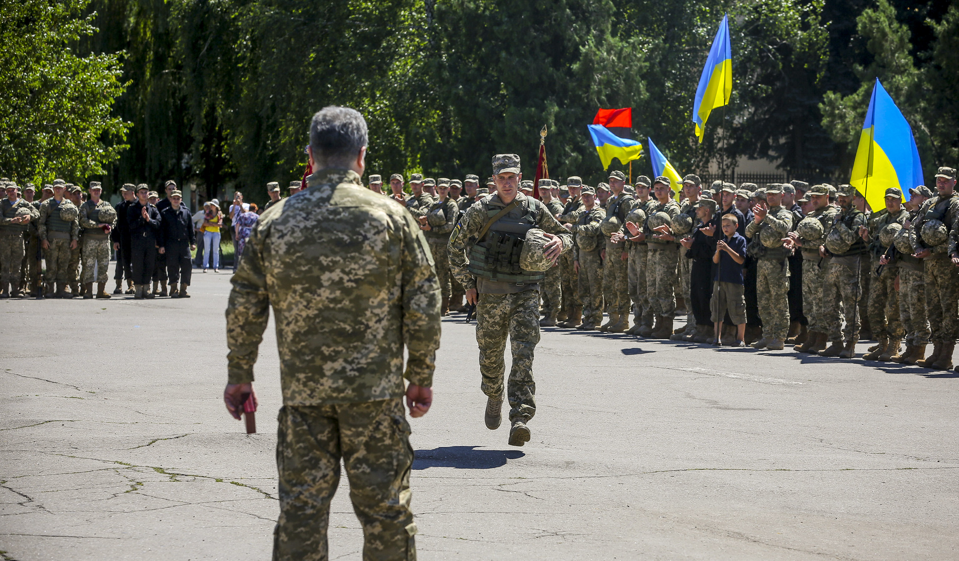 Рабочая поездка Порошенко в Донецкую область